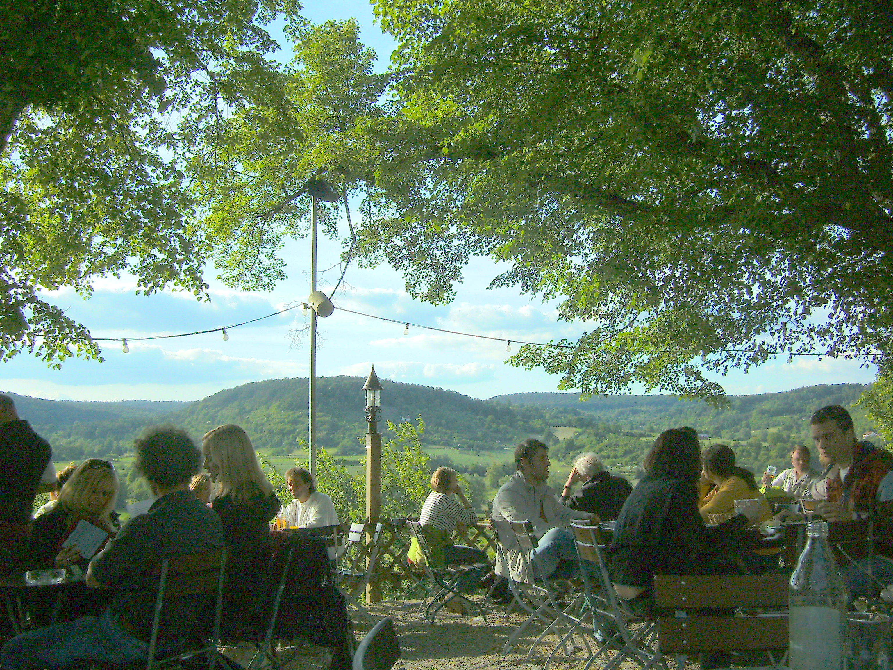 Das Hofgut Schwärzloch ist ein beliebtes, traditionsreiches Ausflugslokal in Tübingen. Bereits im Mittelalter (ca. 1085) wurde es erstmals erwähnt und gehört damit zu den ältesten Wohnplätzen auf Tübinger Stadtgemarkung.